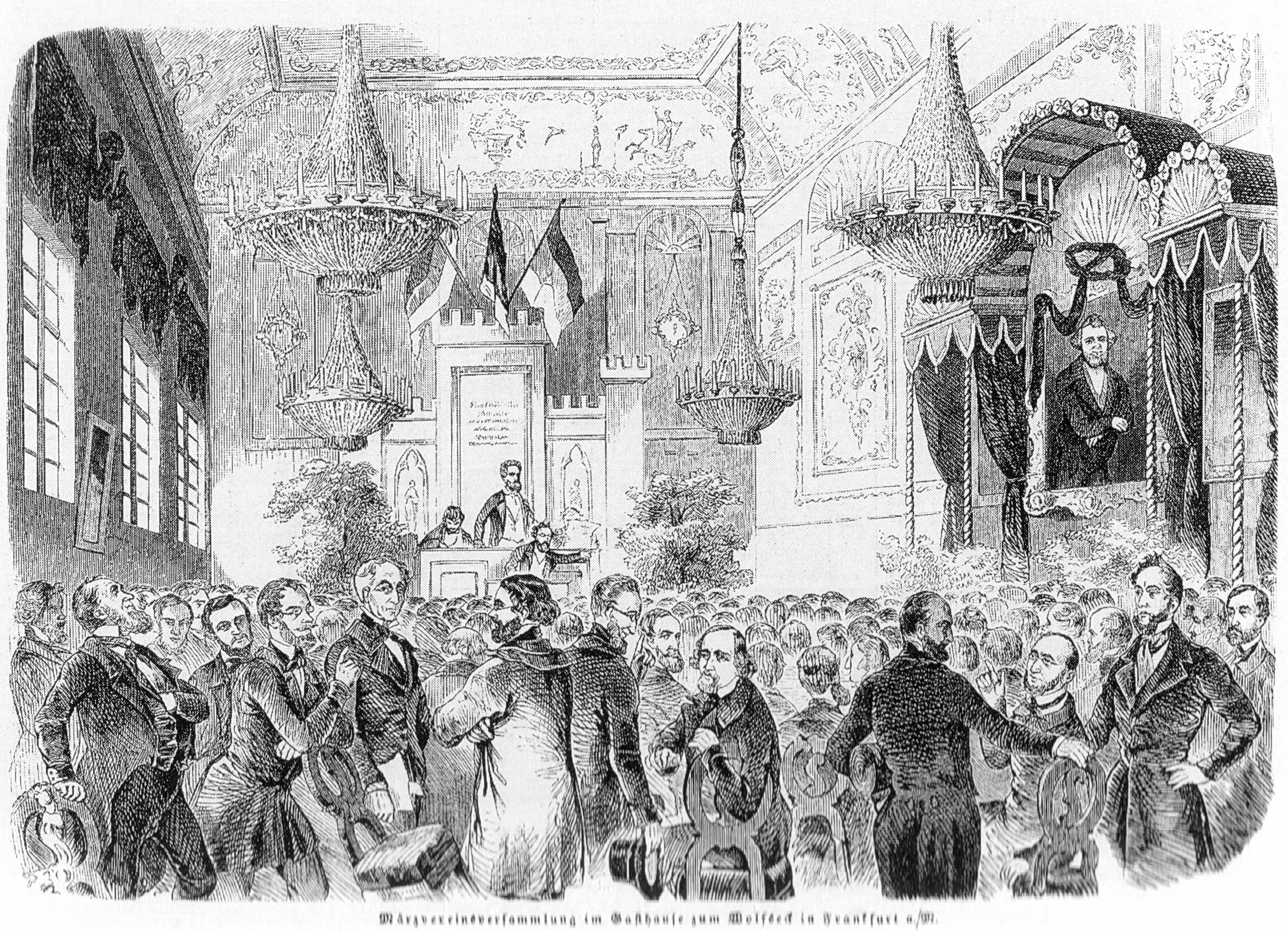 Holzstich. “General-Versammlung der deutschen März-Vereine, 6. Mai 1849”. Aus: Illustrirte Zeitung, Band 12, 9. Juni 1849.